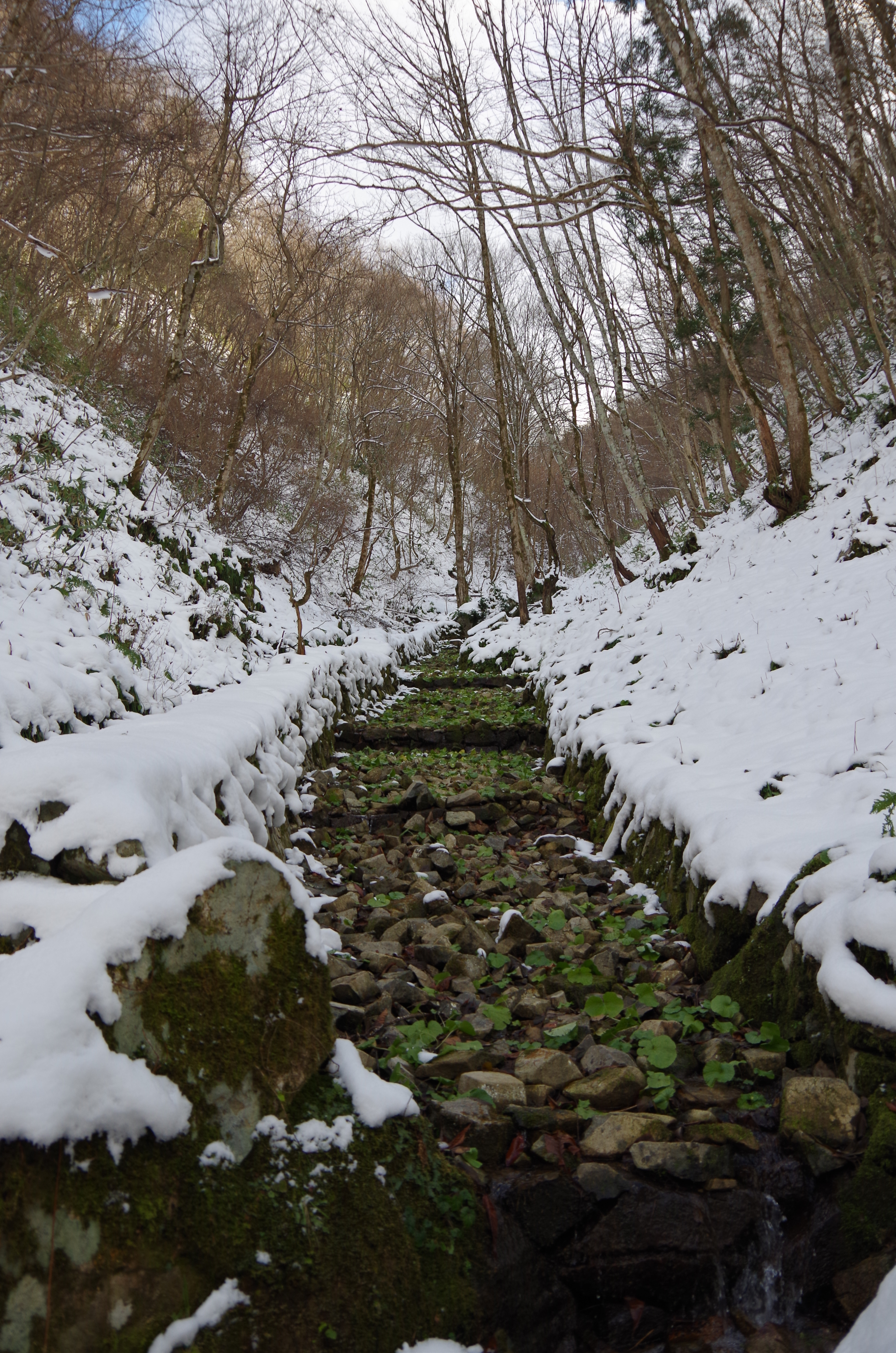 渓流式わさび田。冬の降雪時、通常水の流れにより雪は溶かされるが、溶かしきれずに全てが雪に覆われることがある。